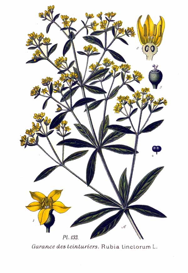 Rubia tinctorum L.